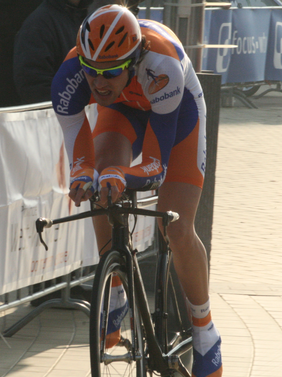 Driedaagse van West-Vlaanderen 2011, proloog in Middelkerke